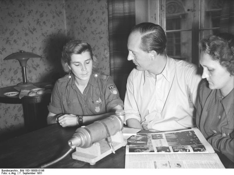 ADN-ZB/Archiv Mißhandelte FDJ'ler berichten dem Großcourth-Ausschuß Am 7.9.1951 berichteten die FDJ-lerinnen Hannchen Küssner, Berlin Treptow, Graetzstraße 62 und Ursula Jentsch, Berlin NO 55, Greifswalder Str. 35 über die Ausschreitungen des Bezirksbürgermeisters Kressmann bei ihrer Verhaftung. v.l.n.r.: Jugendfreundin Hannchen Küssner, Prof. Dr. Robert Havemann und die Jugendfreundin Ursula Jentsch.